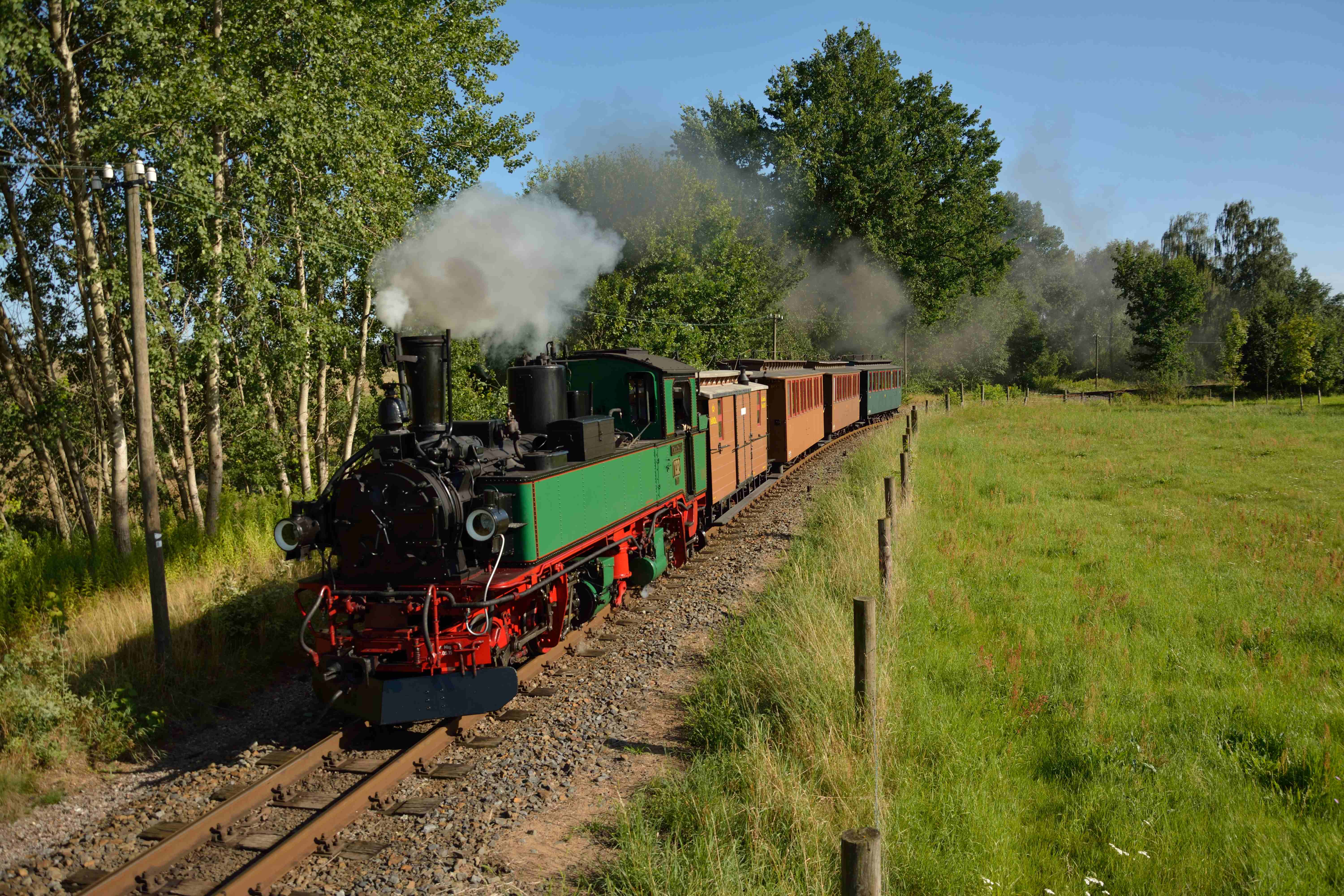 Ein Zug der Traditionsbahn Radebeul, bestehend aus originalgetreu restaurierten Fahrzeugen, verkehrt anlässlich einer Sonderfahrt auf der Schmalspurbahn Radebeul Ost - Radeburg.